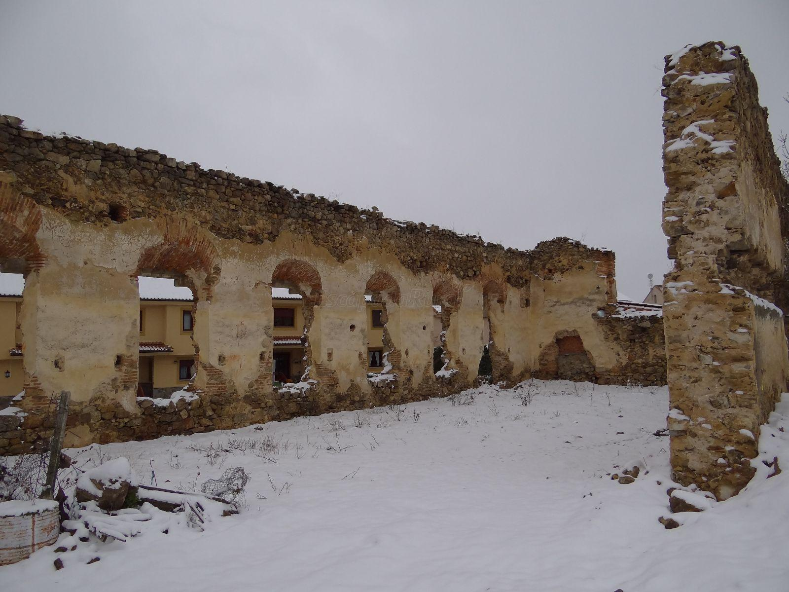 Son los restos de una de las 3 casas de esquileo de la época de Carlos III situadas en Trescasas un municipio de Segovia.